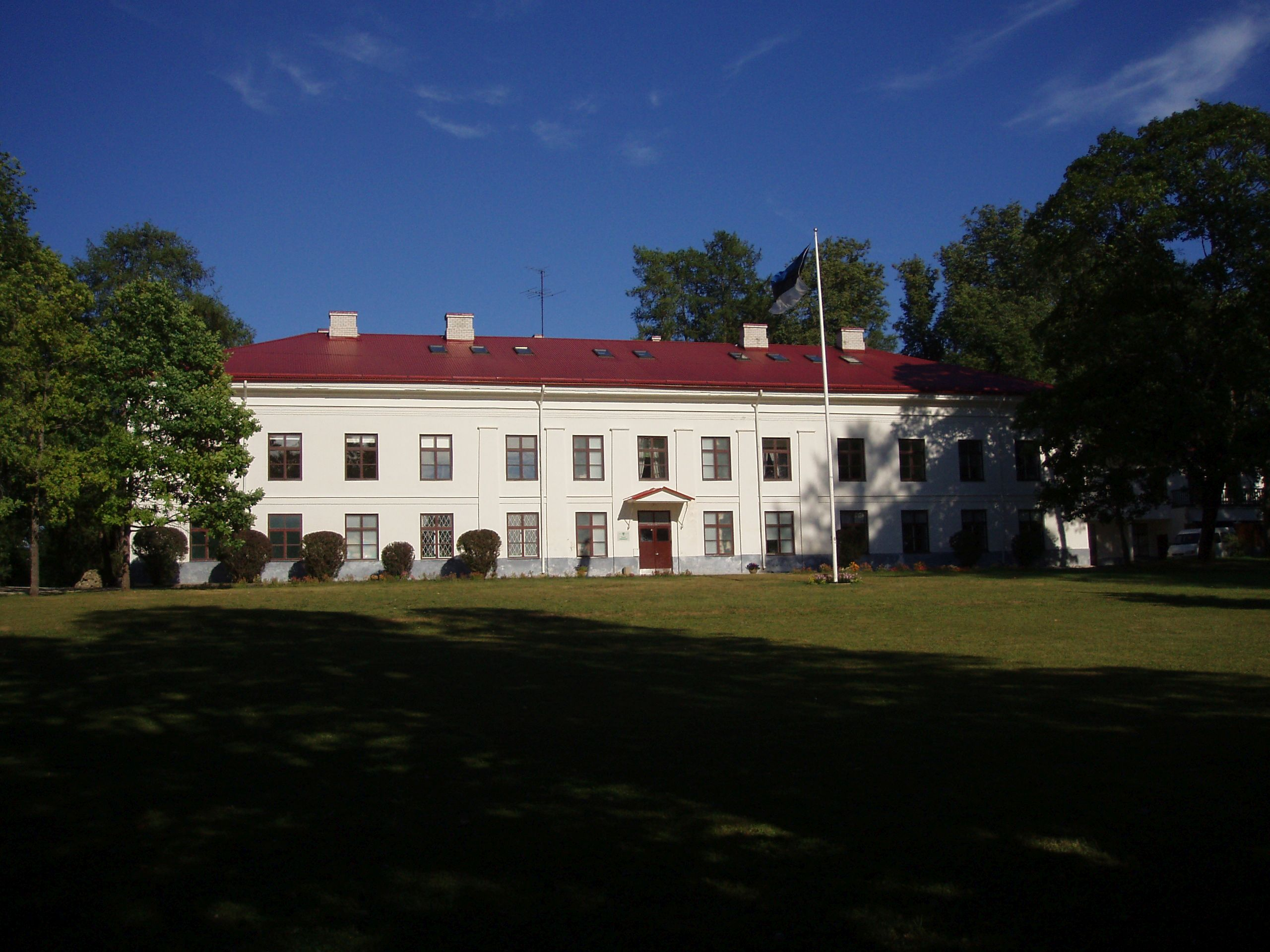 Valgu mõisa peahoone 2006. aastal.